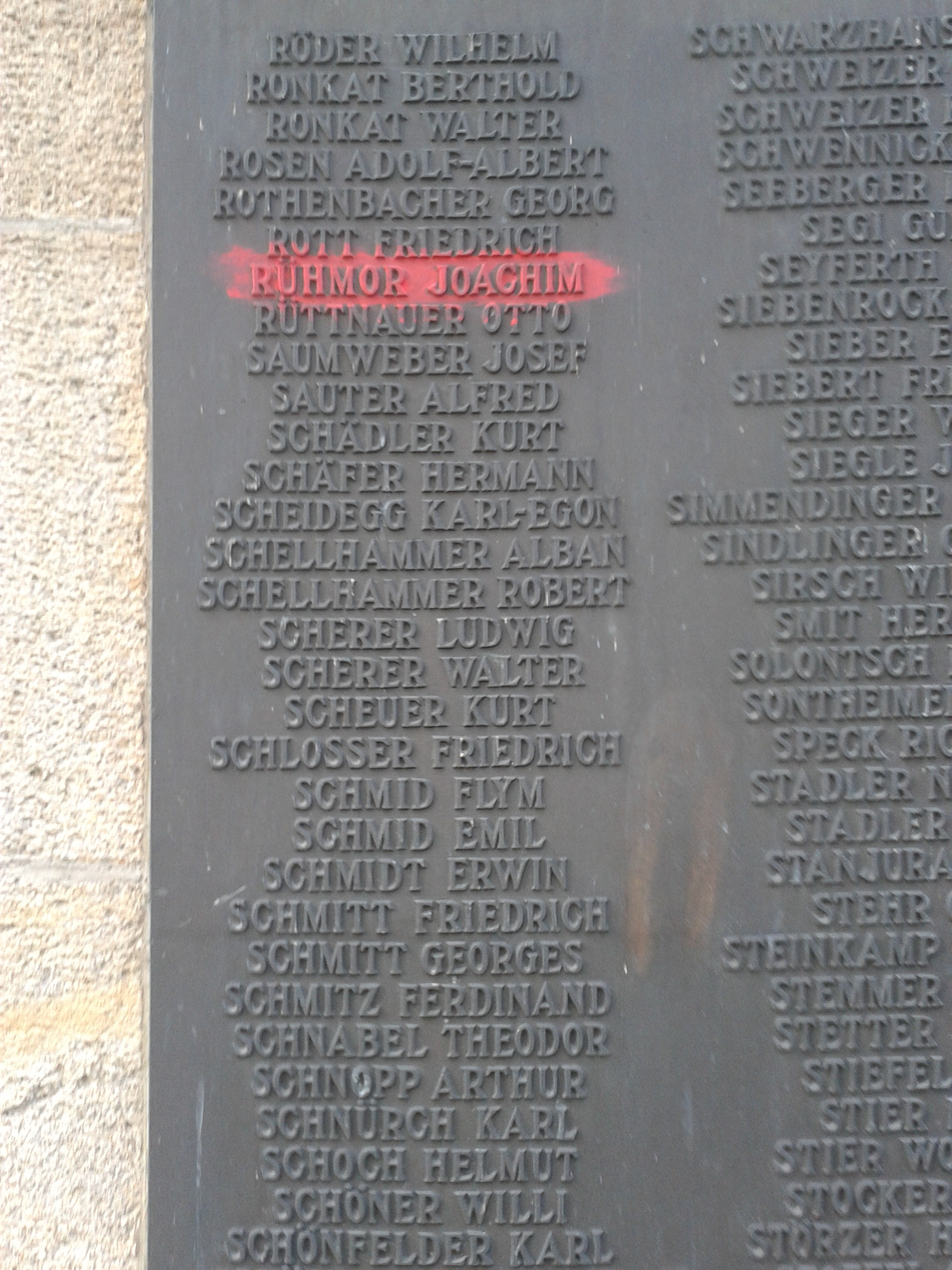 Namenstafel am Kriegerdenkmal Radolfzell für die Gefallenen des Zweiten Weltkriegs; durch Farbauftrag markiert der Name "Joachim Rühmor" (recte: Rumohr)